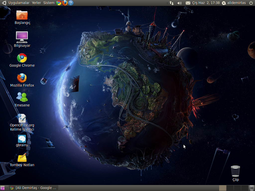 Ubuntu 10.04 LTS ekran görüntüsü